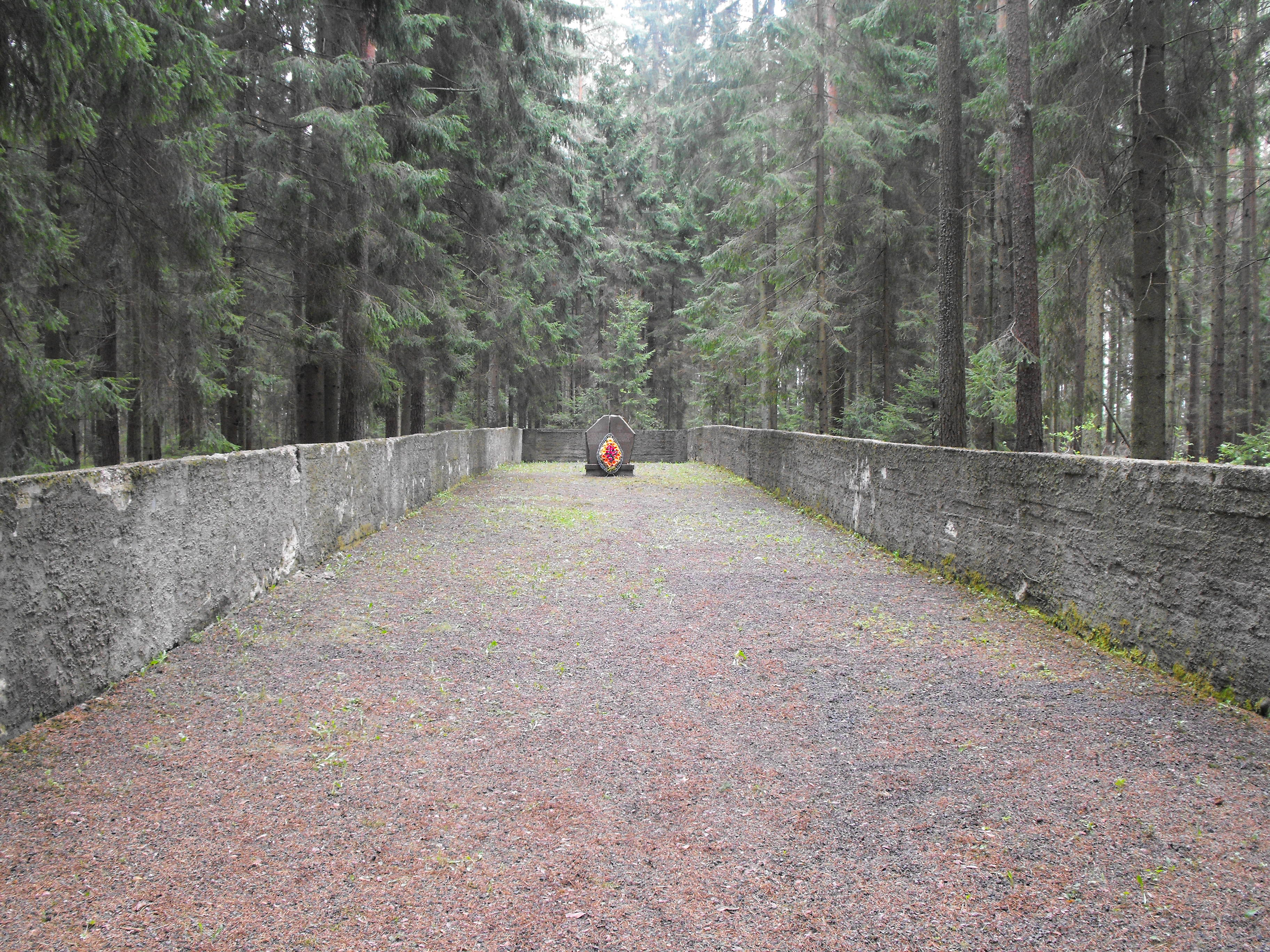 Место убийства нацистами евреев из гетто Зембина